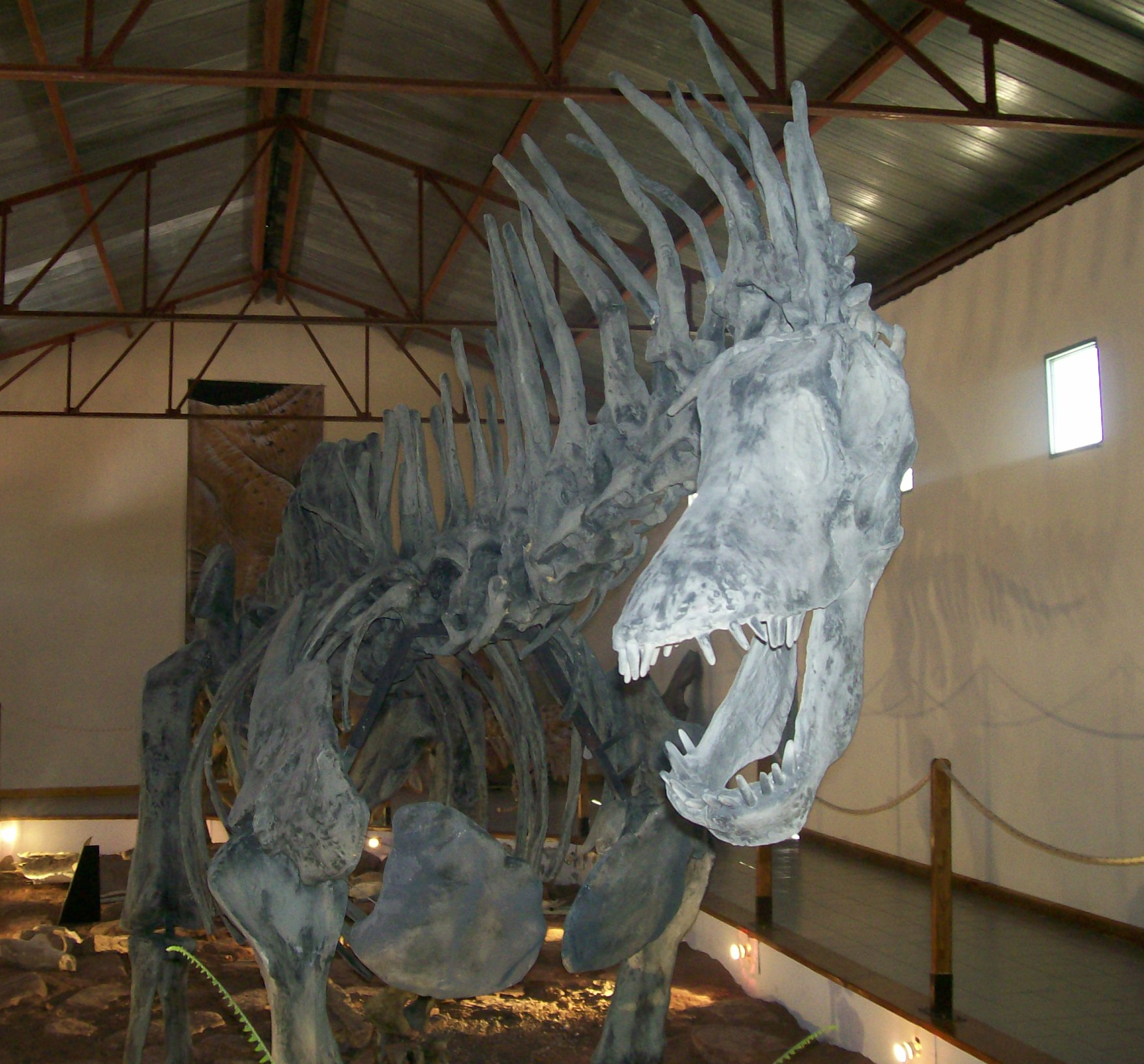 Amargasaurus Cazaui.